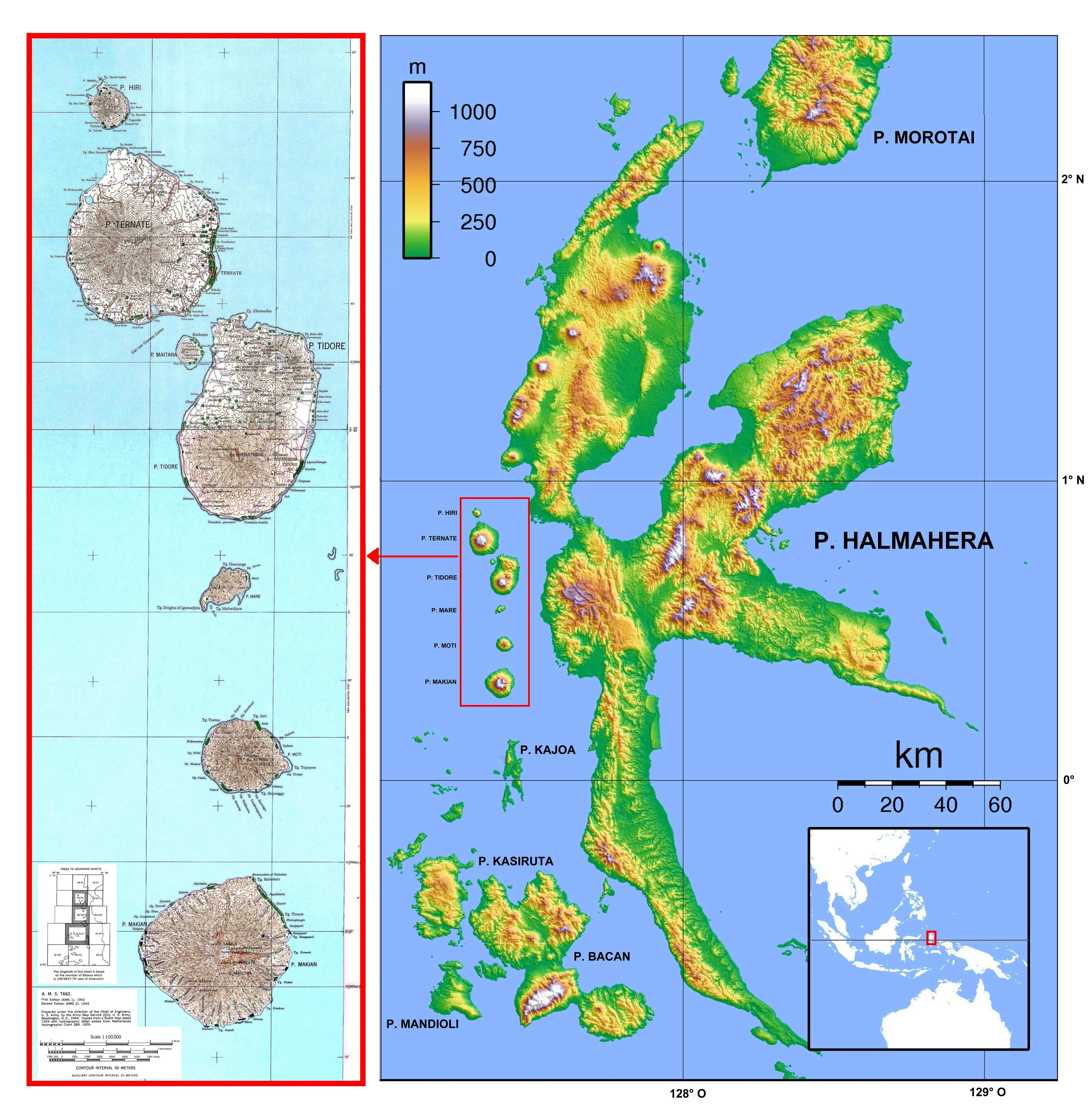 Inselkette von Ternate bis Makian vor der Westküste der indonesischen Insel Halmahera